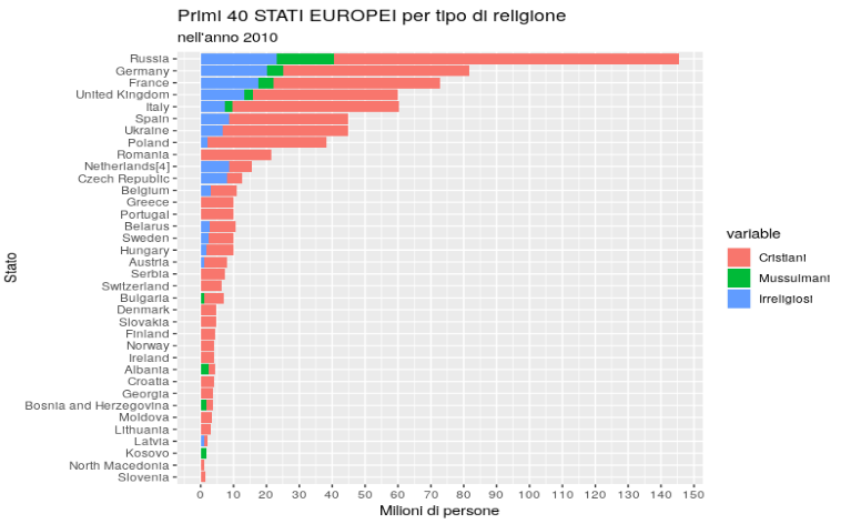 file realizzato con RStudio con i seguenti dati